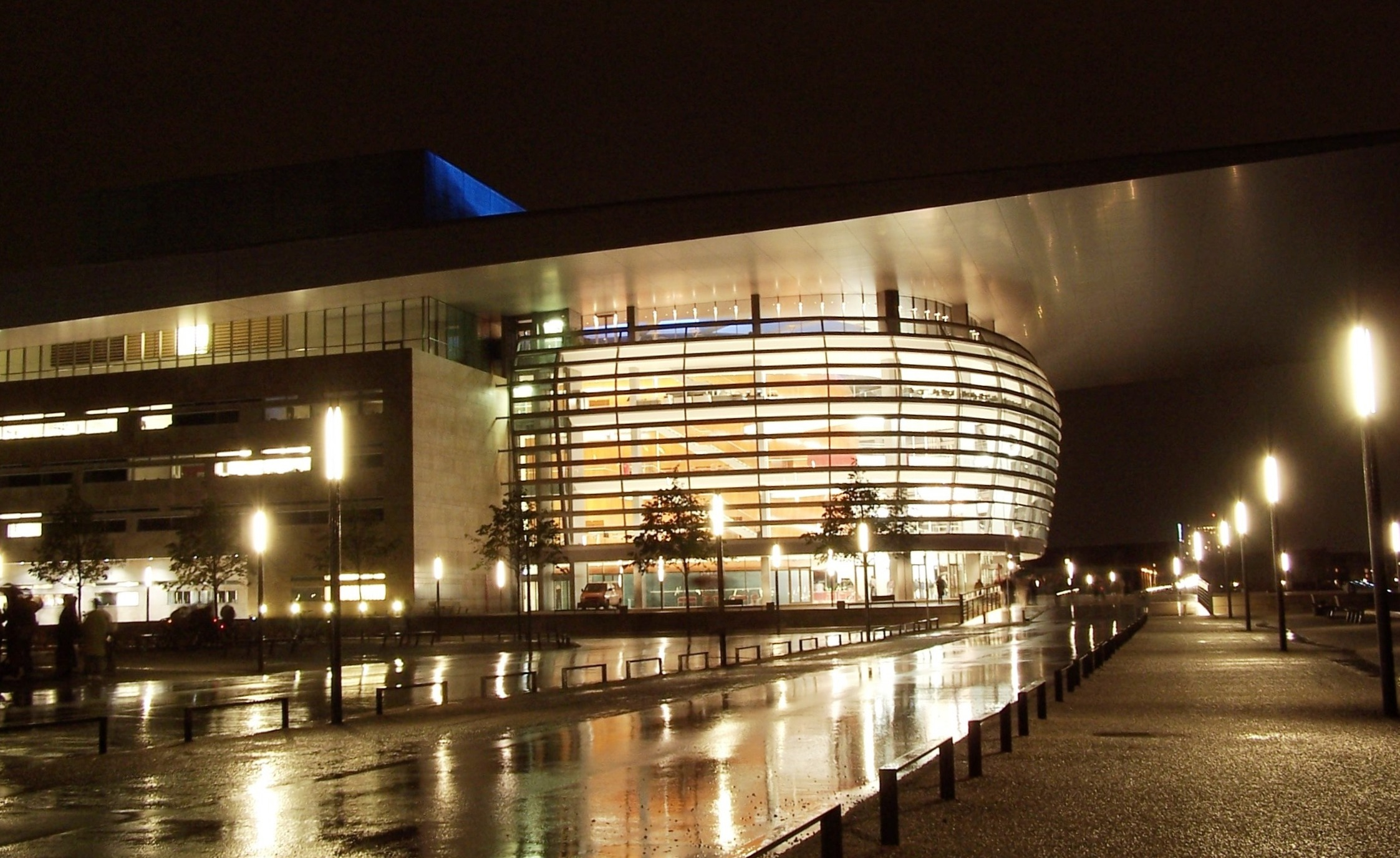 Copenhagen Opera, outside (taken from north)